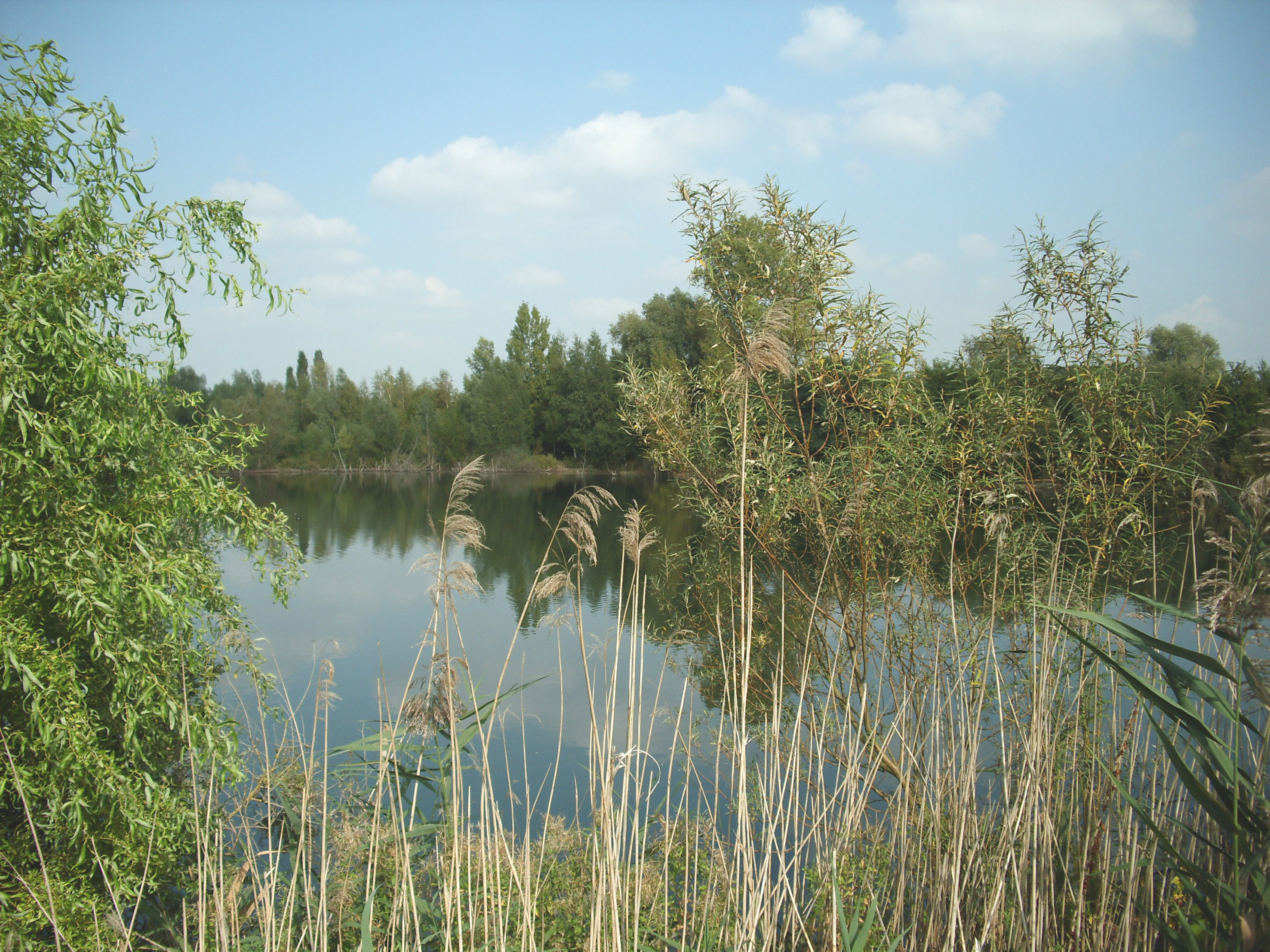 Een van drie voormalige kleiputten in De Roomakker - Tielrode - Temse - Oost-Vlaanderen - Vlaanderen - België